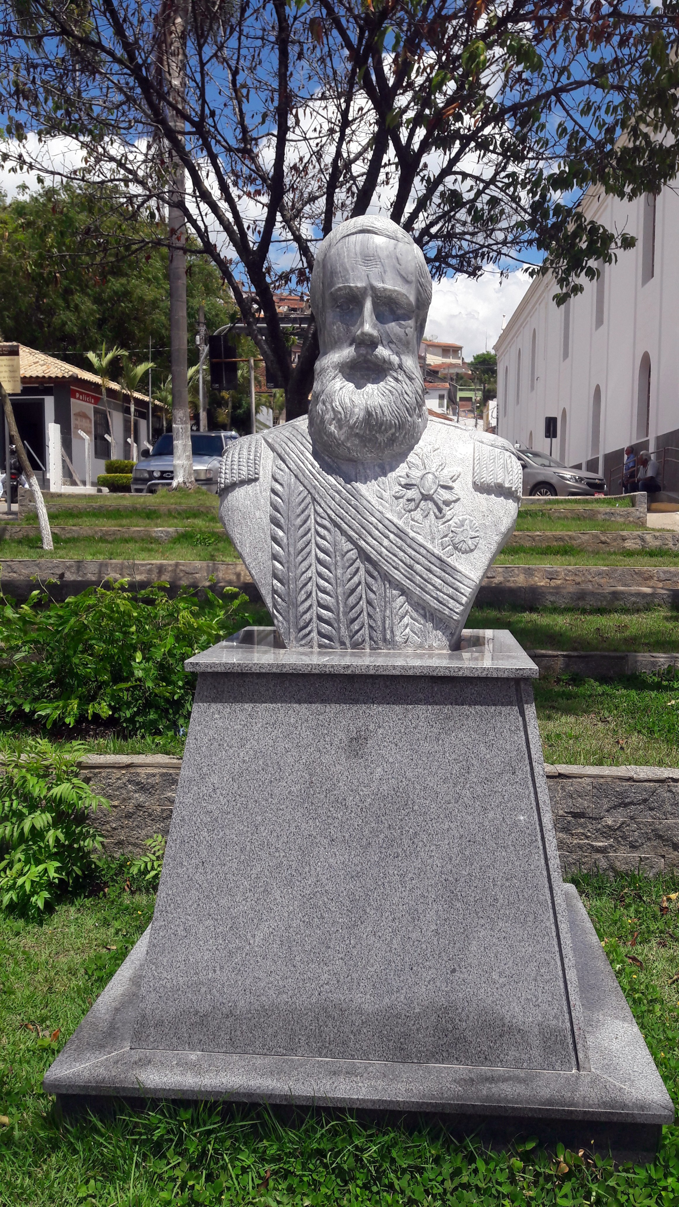 Busto de Dom Pedro II em São Luís do Paraitinga